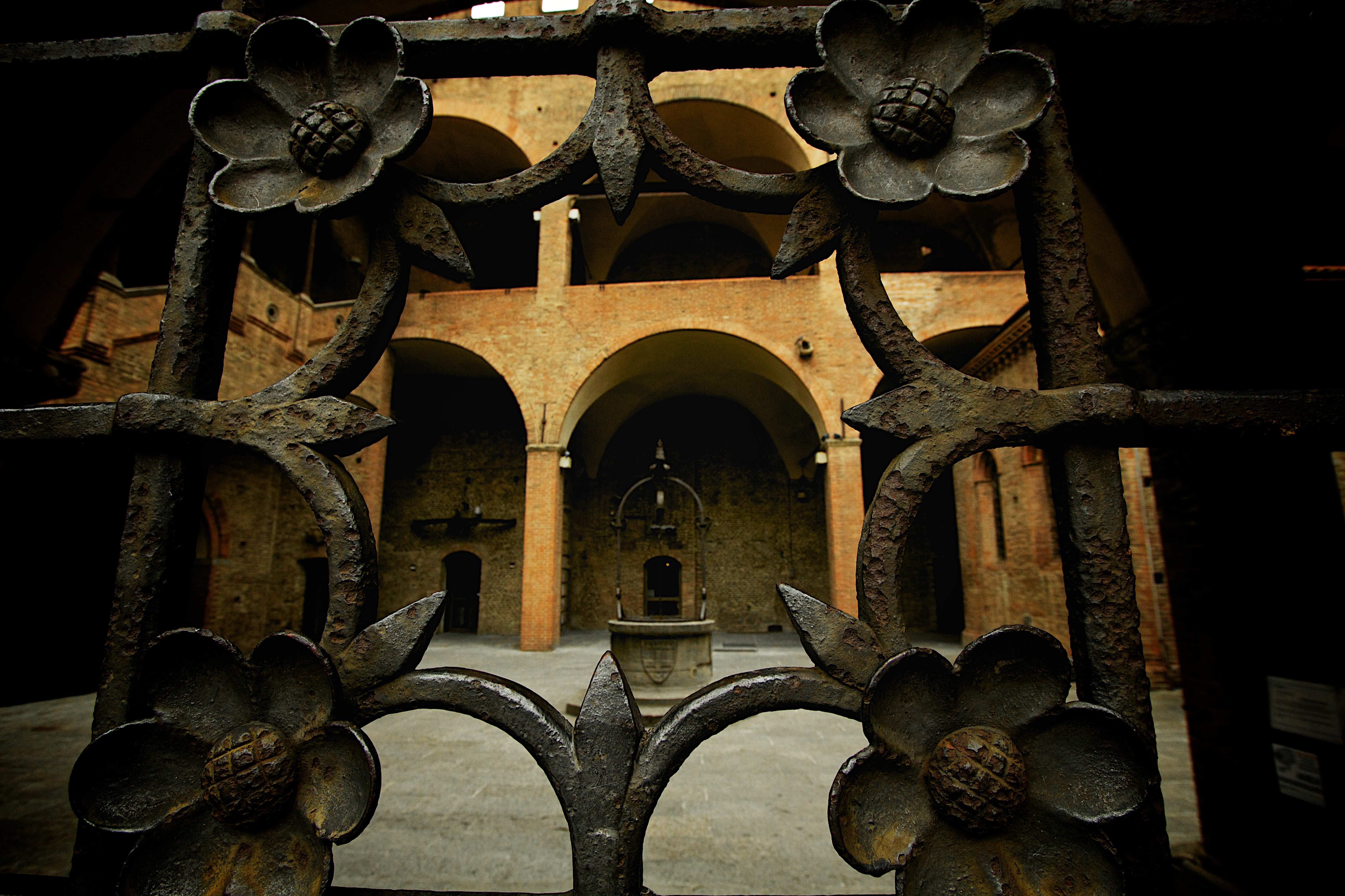 Palazzo Re Enzo - MIBAC This is a photo of a monument which is part of cultural heritage of Italy.